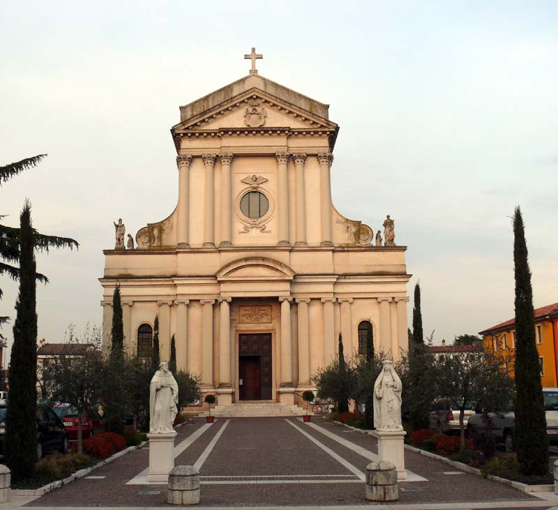 Dossobuono: Chiesa Parrocchiale di Santa Maria Maddalena.